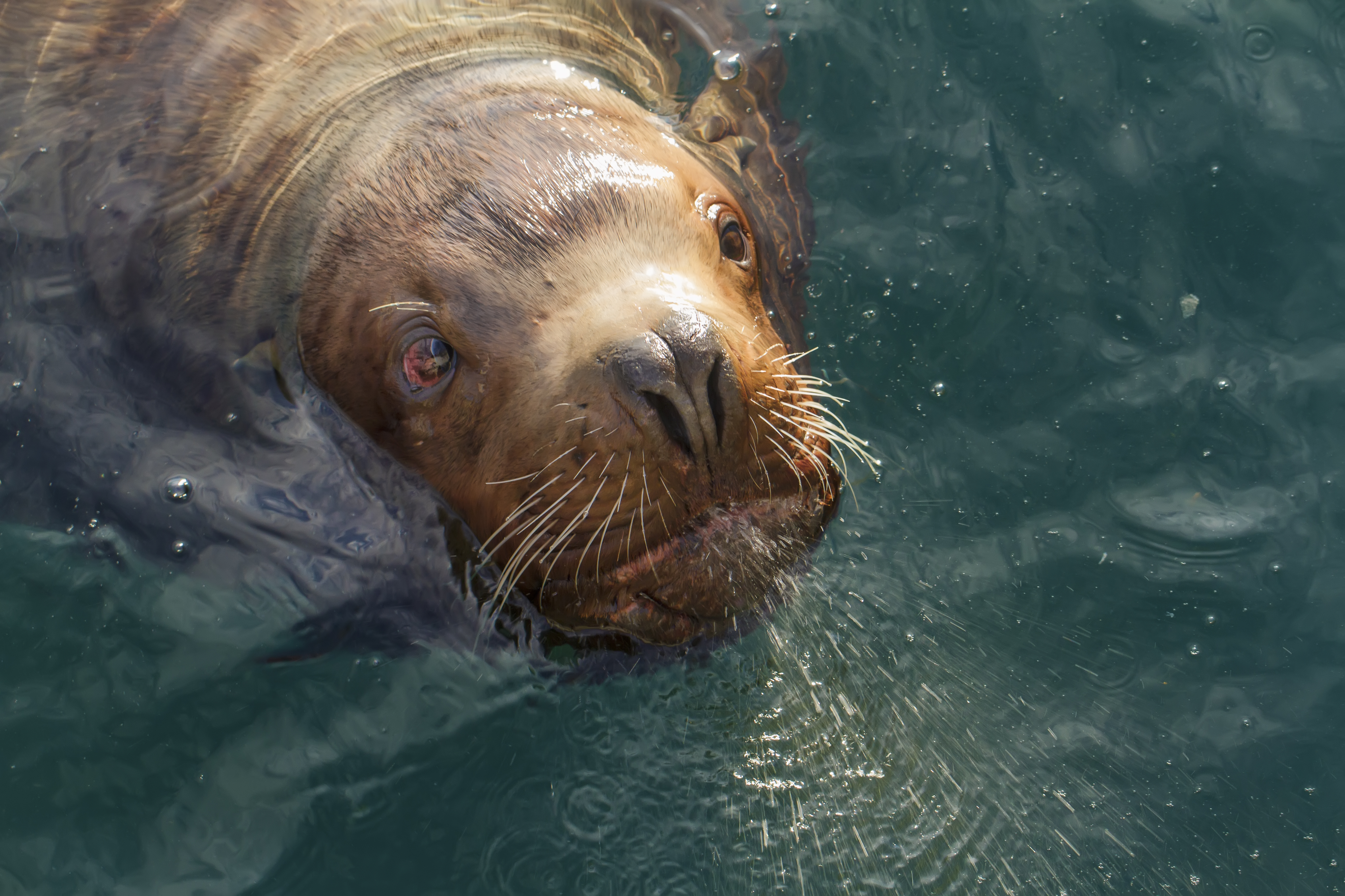 Лежбище сивучей в Петропавловске-Камчатском: Авачинская бухта, пирс в поселке Авача, Петропавловск-Камчатский, Камчатский край This image is related to the protected area of Russia number 4110151